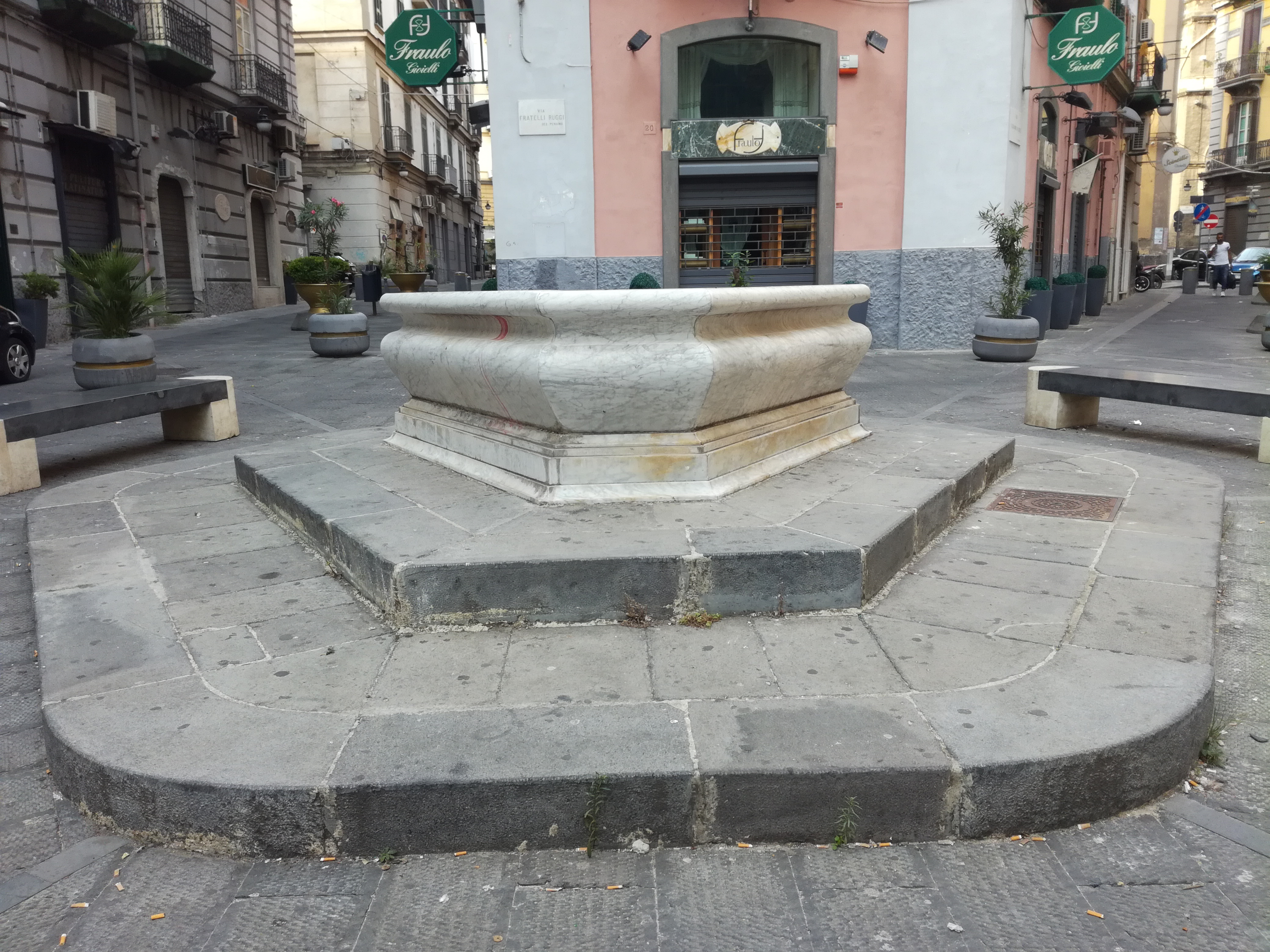 Fontana del Pesce